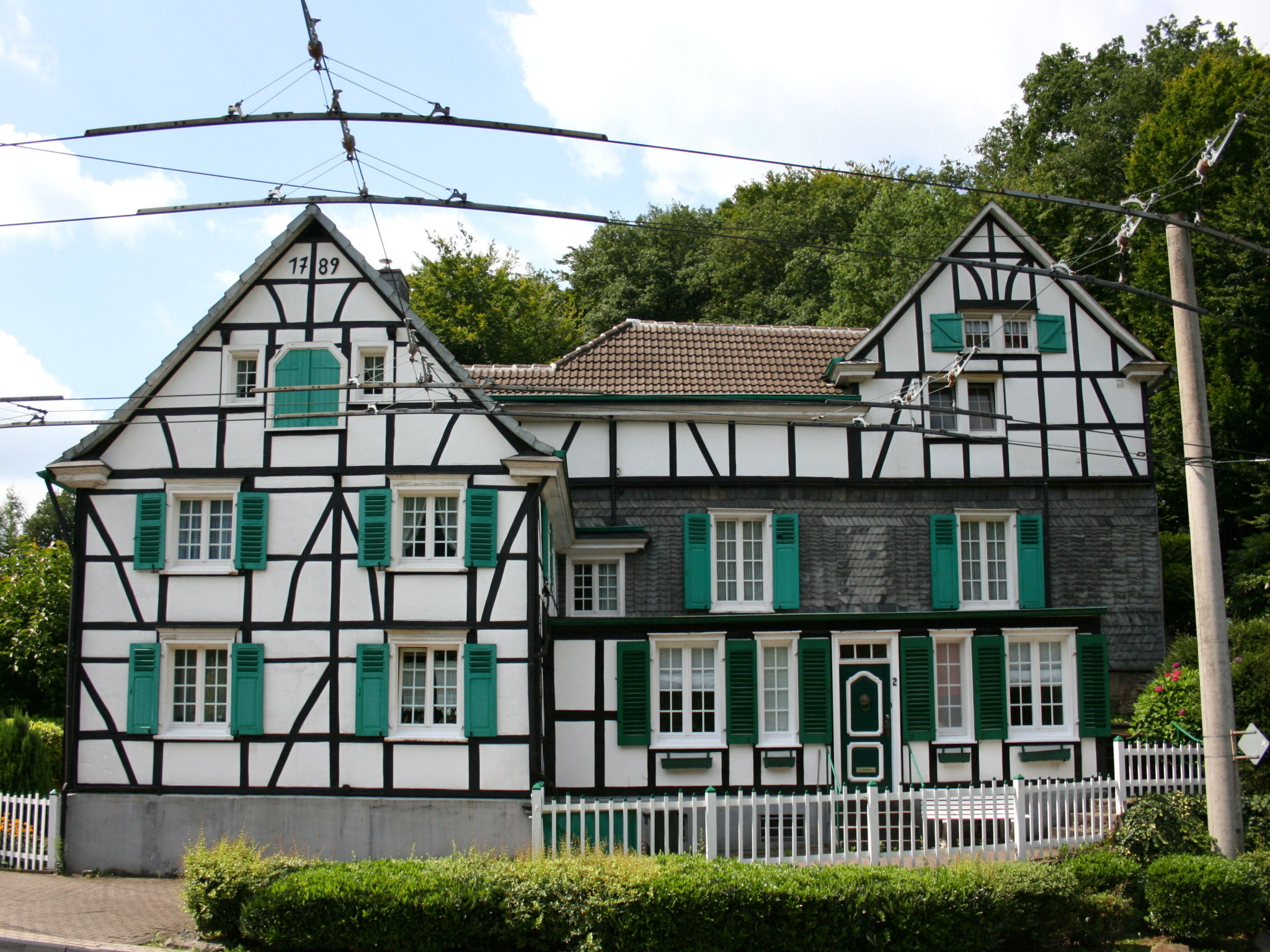 Solingen-Burg (Unterburg)